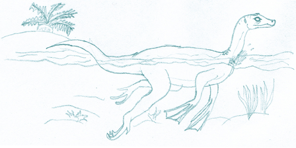 Dibujo de la hipótesis de que el "Compsognathus corallestris" habría tenido aletas en las patas delanteras, con las cuales llevaba una vida anfibia. Pero los estudios recientes del esqueleto desaprueban esta hipótesis. Este dibujo lo hice yo con lápiz y papel, después lo escanie y edite en photoshop para publicarlo aquí.